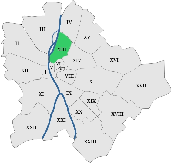 map hungary budapest district 13